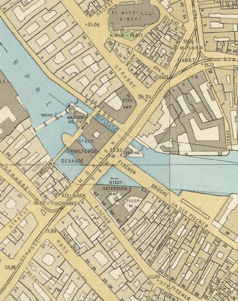 Das amtliche Kartenwerk “Stadtplan von Berlin” im Maßstab 1:4.000 wurde von den Bezirksvermessungsämtern nach personellem und organisatorischem Vermögen bearbeitet. Quelle für die einzelnen Blattschnitte: Landesarchiv Berlin, Histomap Berlin, Nach Aussage des Landesarchiv Berlin stehen die Daten aus der Histomap unter Opendata frei verfügbar, Quellennachweis erbeten. Die Zuordnung der einzelnen Ausschnitte erfolgt über den Dateinamen: erste vierstellige Nummer = Blattschnitt (s. extra Datei) zweite vierstellige Nummer = Jahr der Veröffentlichung lt. Histomap Die einzelnen Ausschnitte wurden als georeferenzierte TIFs gespeichert. Die Georeferenzierung erfolgte anhand von Referenzpunkten über OpenStreetMap und über die Blattübergreifenden Elemente, so dass die Blätter sich möglichst nahtlos aneinander reihen lassen. Dabei kommt es zu kleinen Verzerrungen und Ungenauigkeiten, die hinsichtlich einer Gesamtkarte von Berlin hingenommen wurden. Zusätzlich wurden die Bilder technisch per Grafiksoftware mit Bedacht optimiert, so daß eine bessere Darstellung erreicht wird. Maßstab: 1:4.000 Koordinatenbezugssystem (KBS): WGS84/Pseudo-Mercator